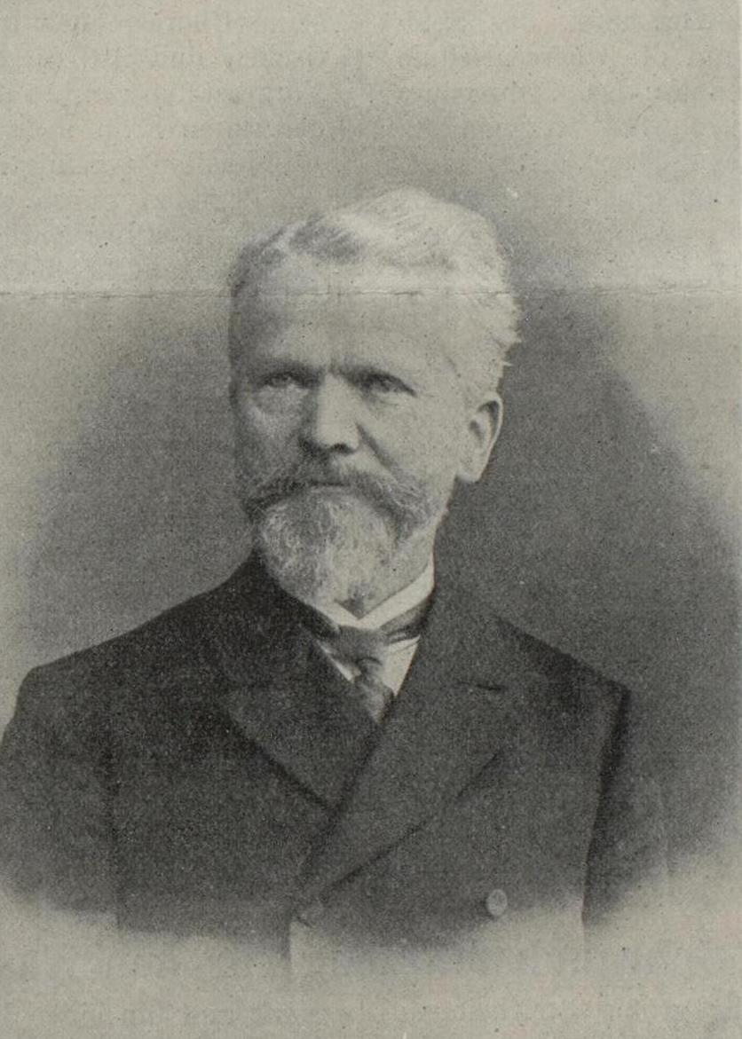 Porträt-Foto von Oskar Delius